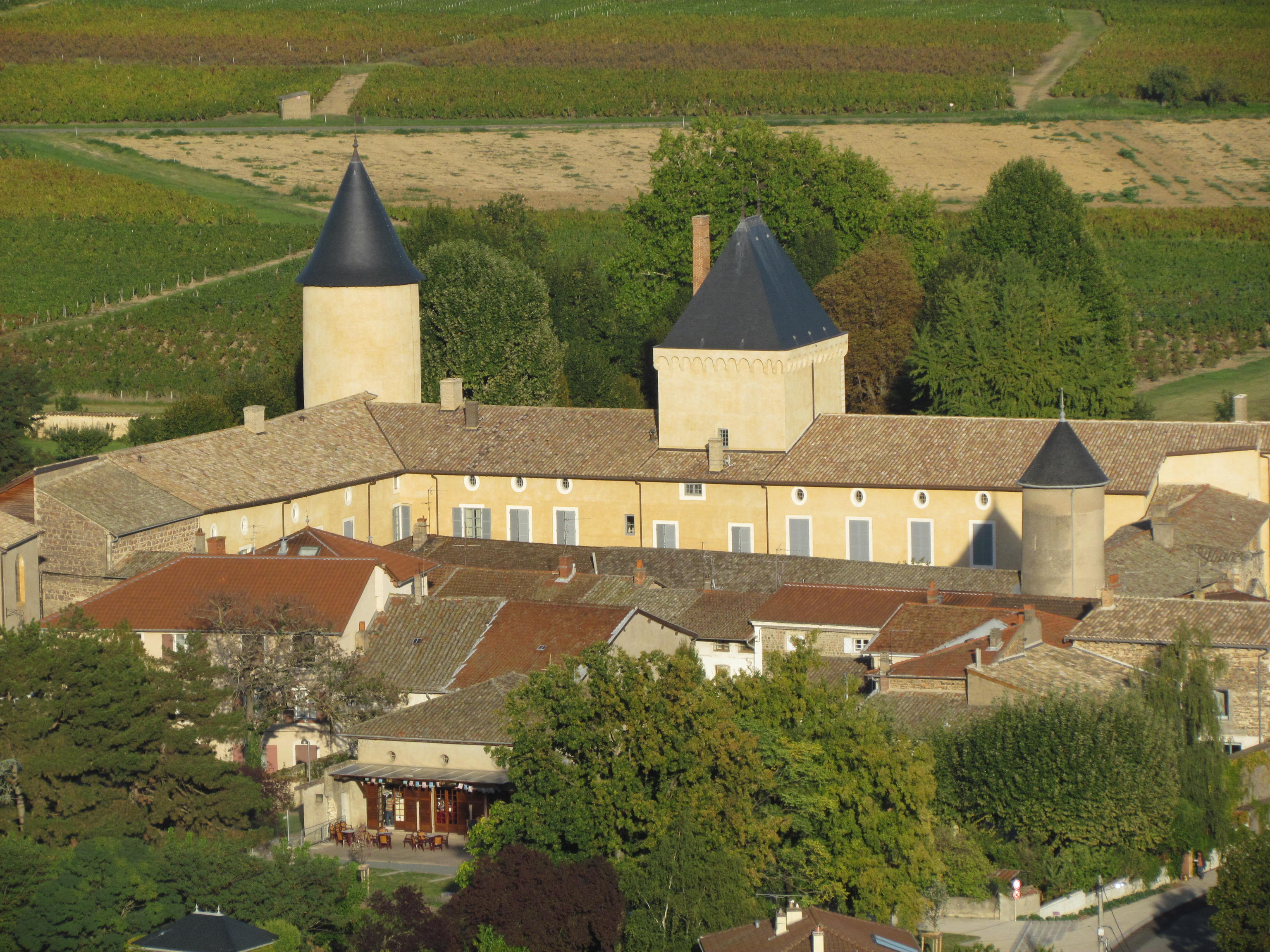 Chateau de Saint Lager: les façades et les toitures du donjon et de la tour ronde